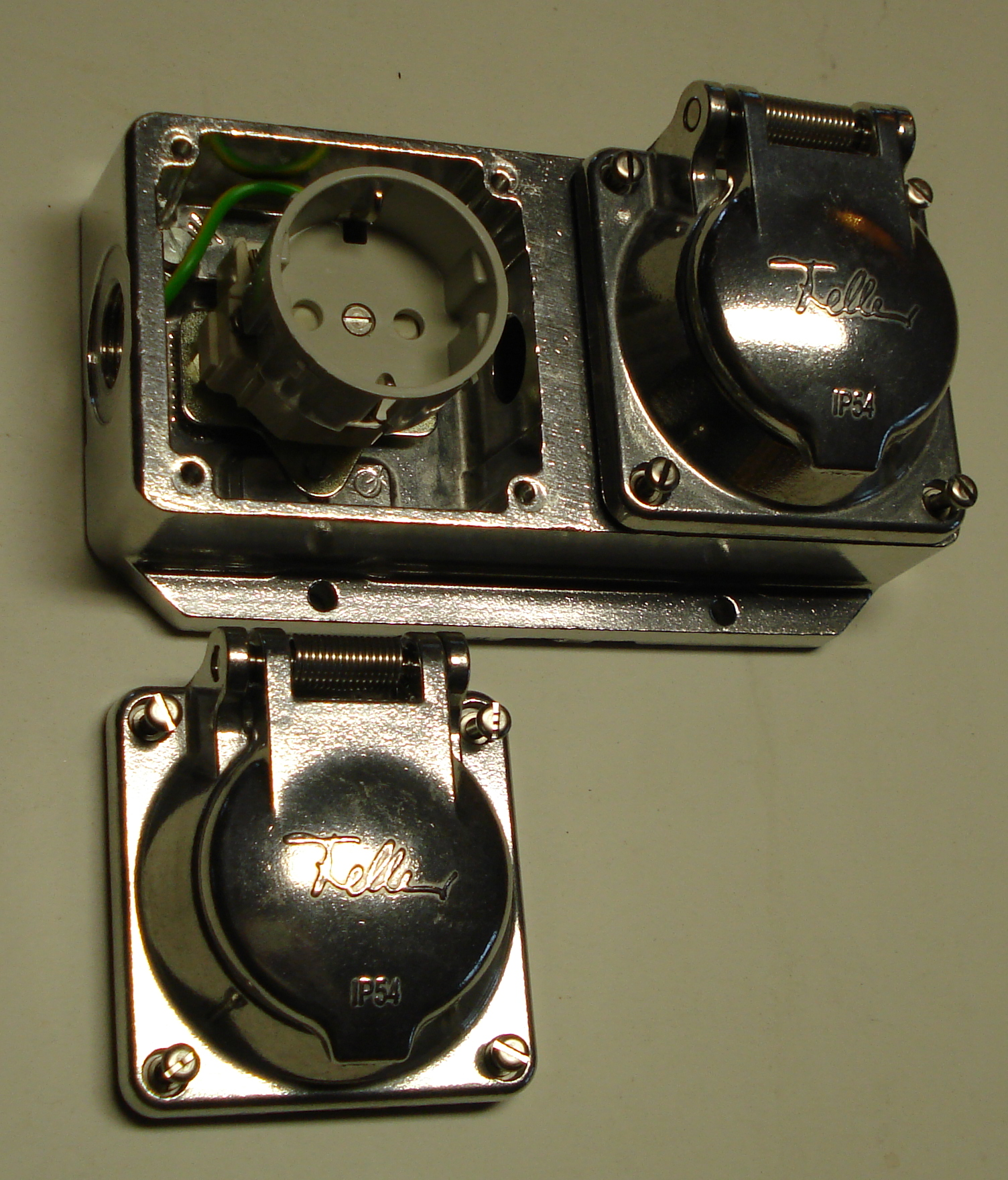 Bauteile Aufputzdose